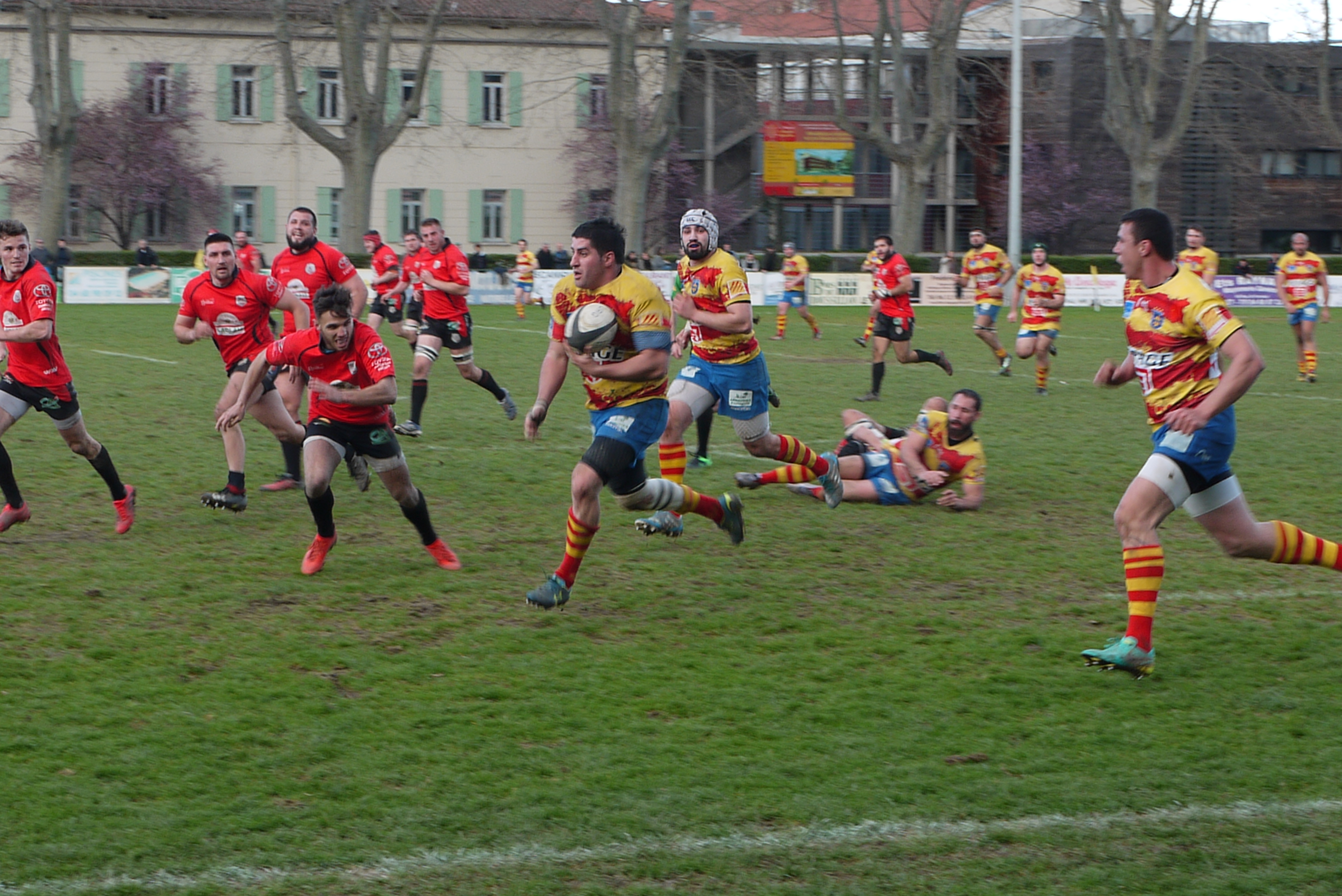 Match Céret sportif-Union athlétique gaillacoise à Céret